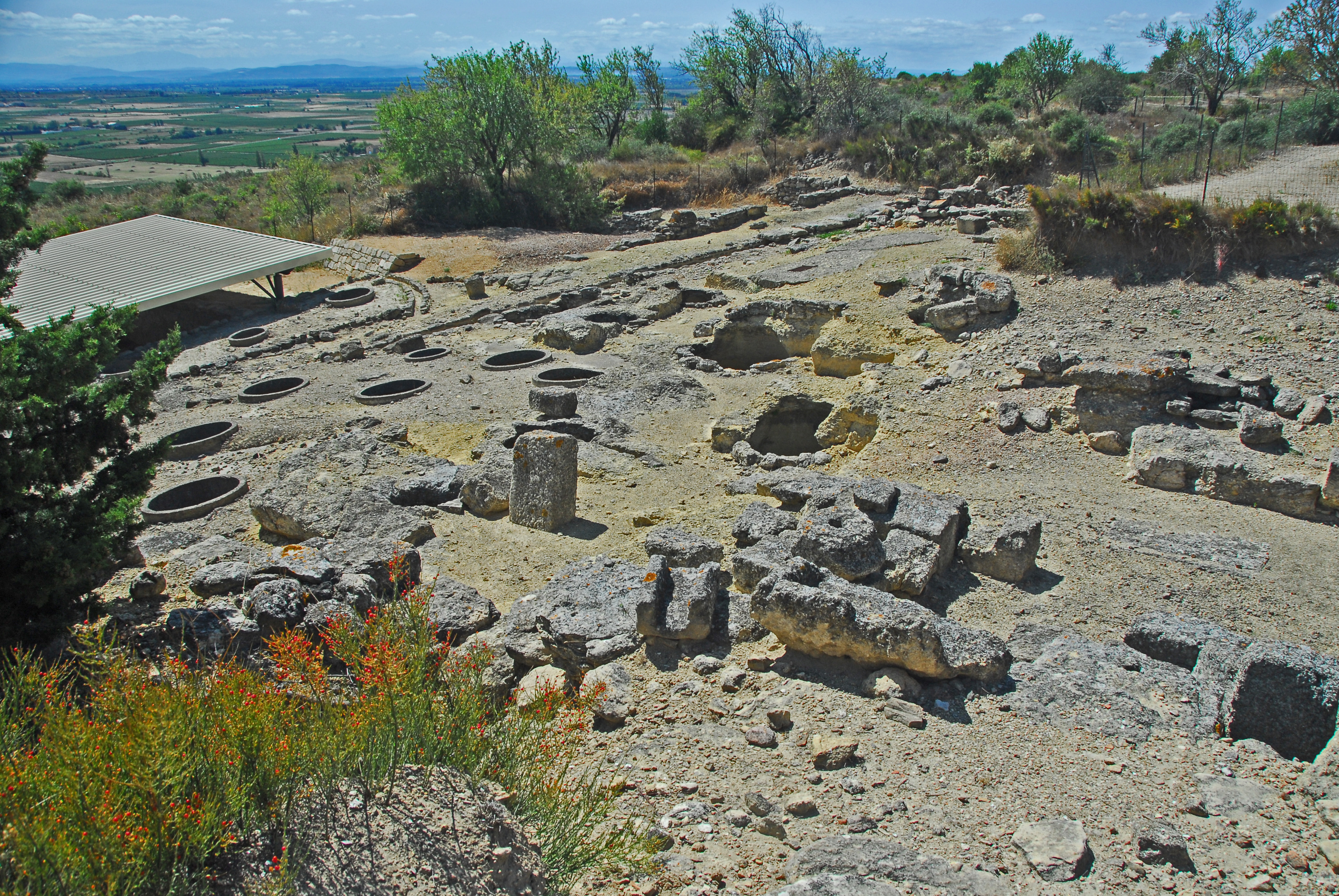 Oppidum d'Ensérune, über dem "Château de l'eau" nach SW